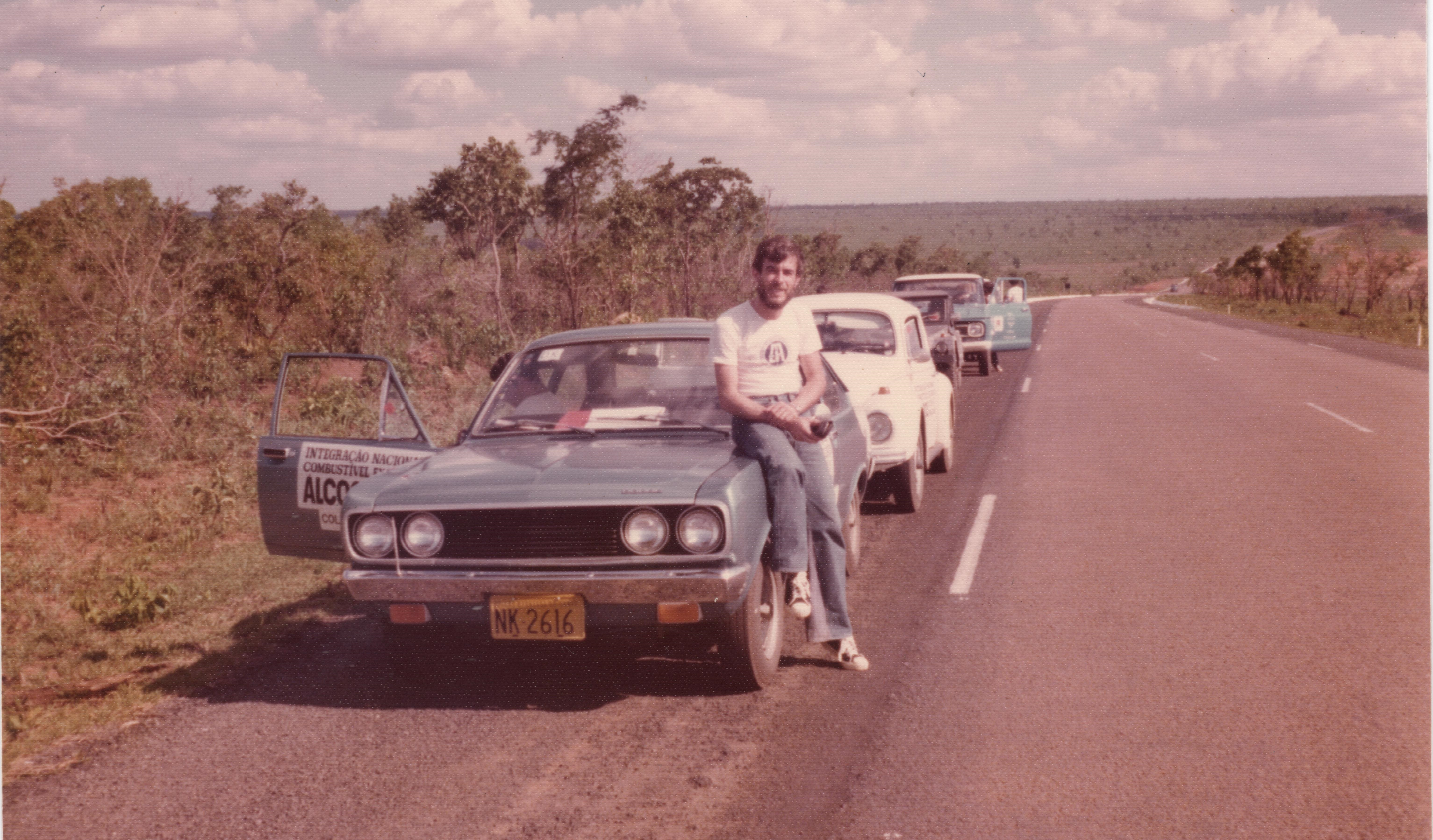 Foto tirada no trecho Sao Paulo - Campo Grande dos veiculos transformados para uso de alcool exclusivo pelo Departamento de Motores do Centro Tecnico Aeroespacial do Ministerio da Aeronautica.